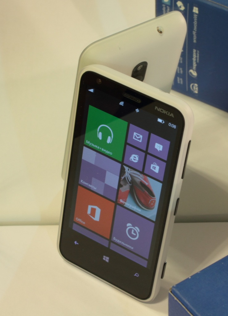 Купленный мной телефон Nokia Lumia 620